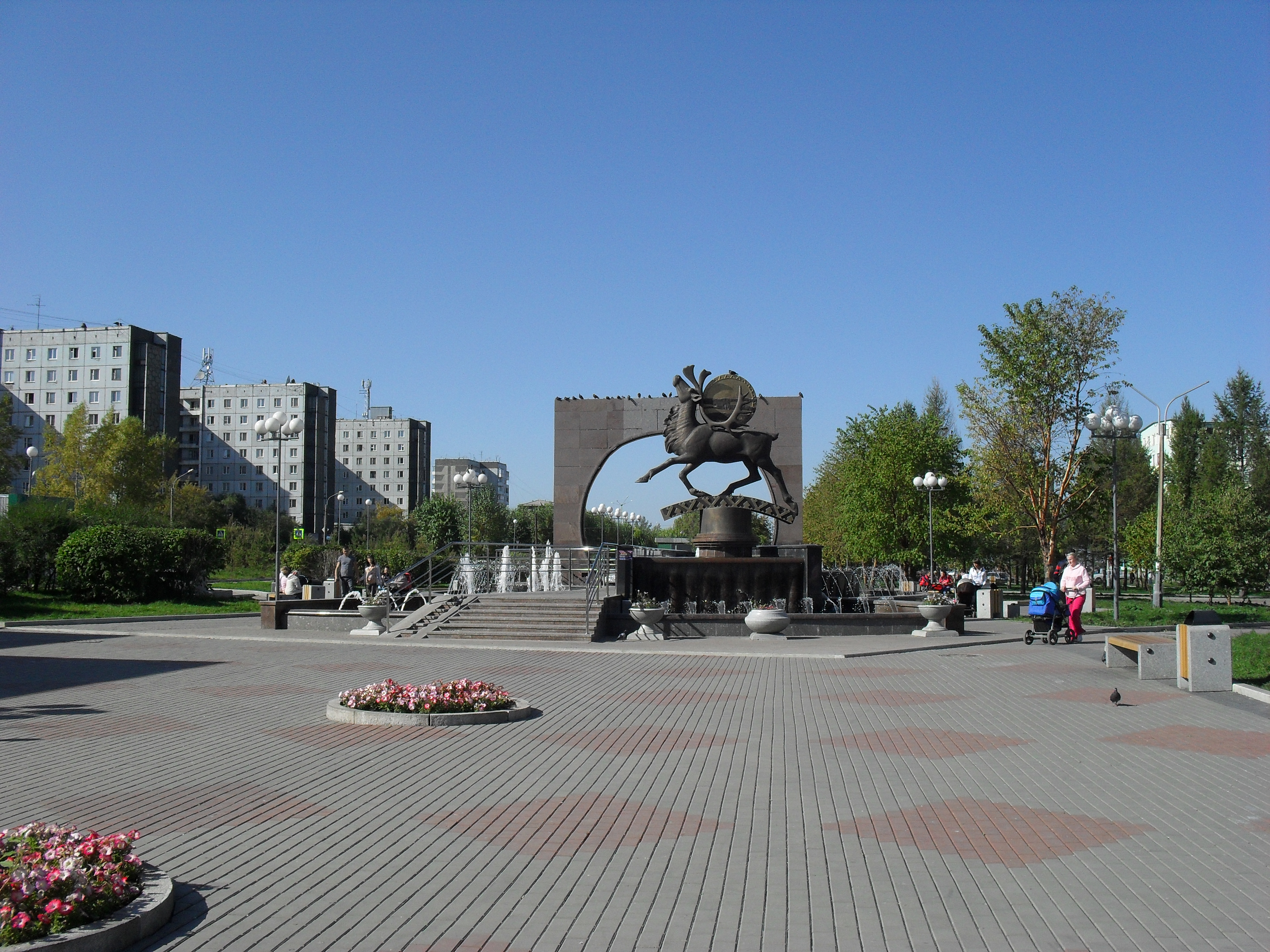 Фонтан "Северное сияние" Красноярск, мкрн. Солнечный, бул. Солнечный.